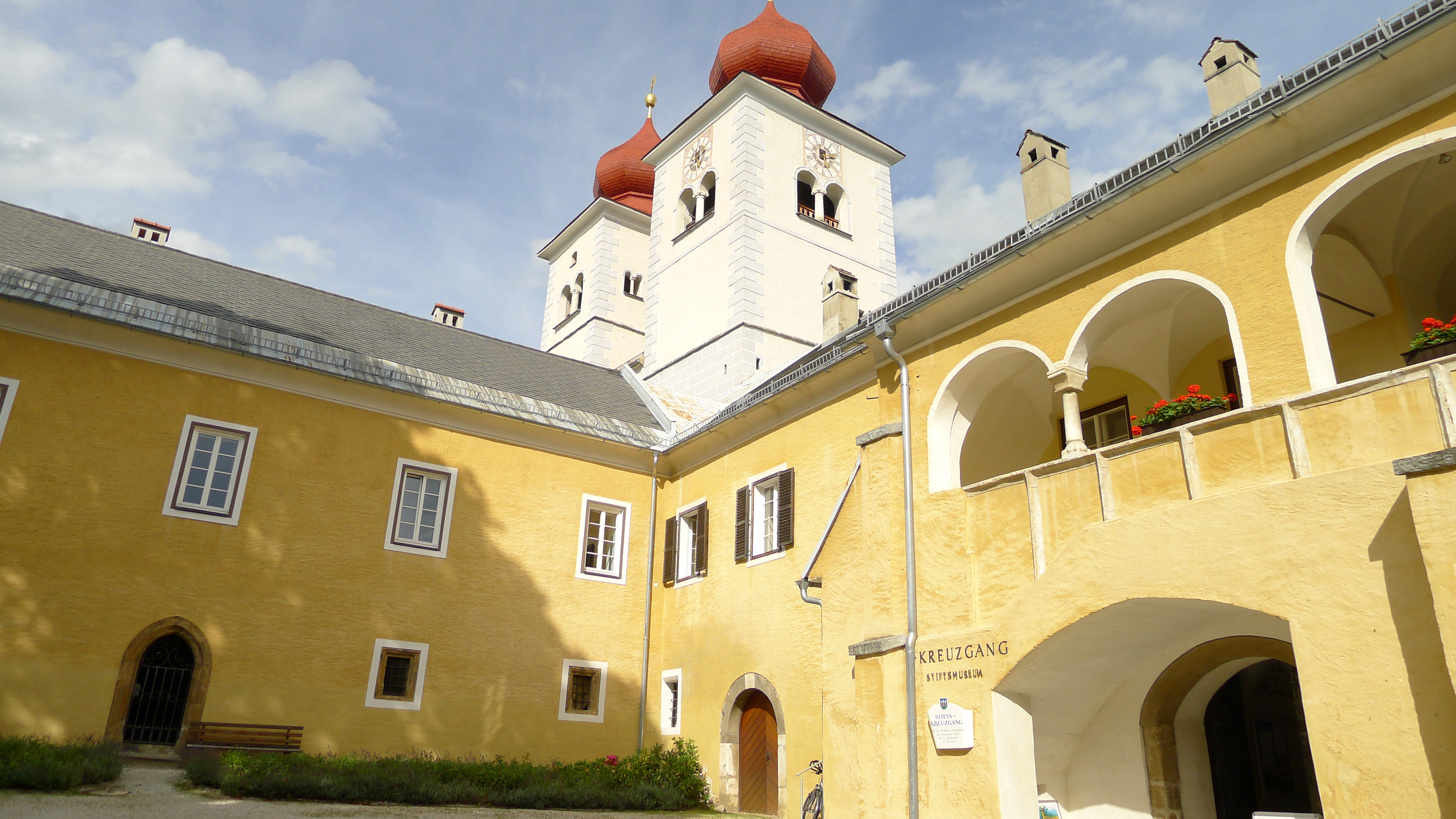 Ehem. Benediktinerstift Millstatt